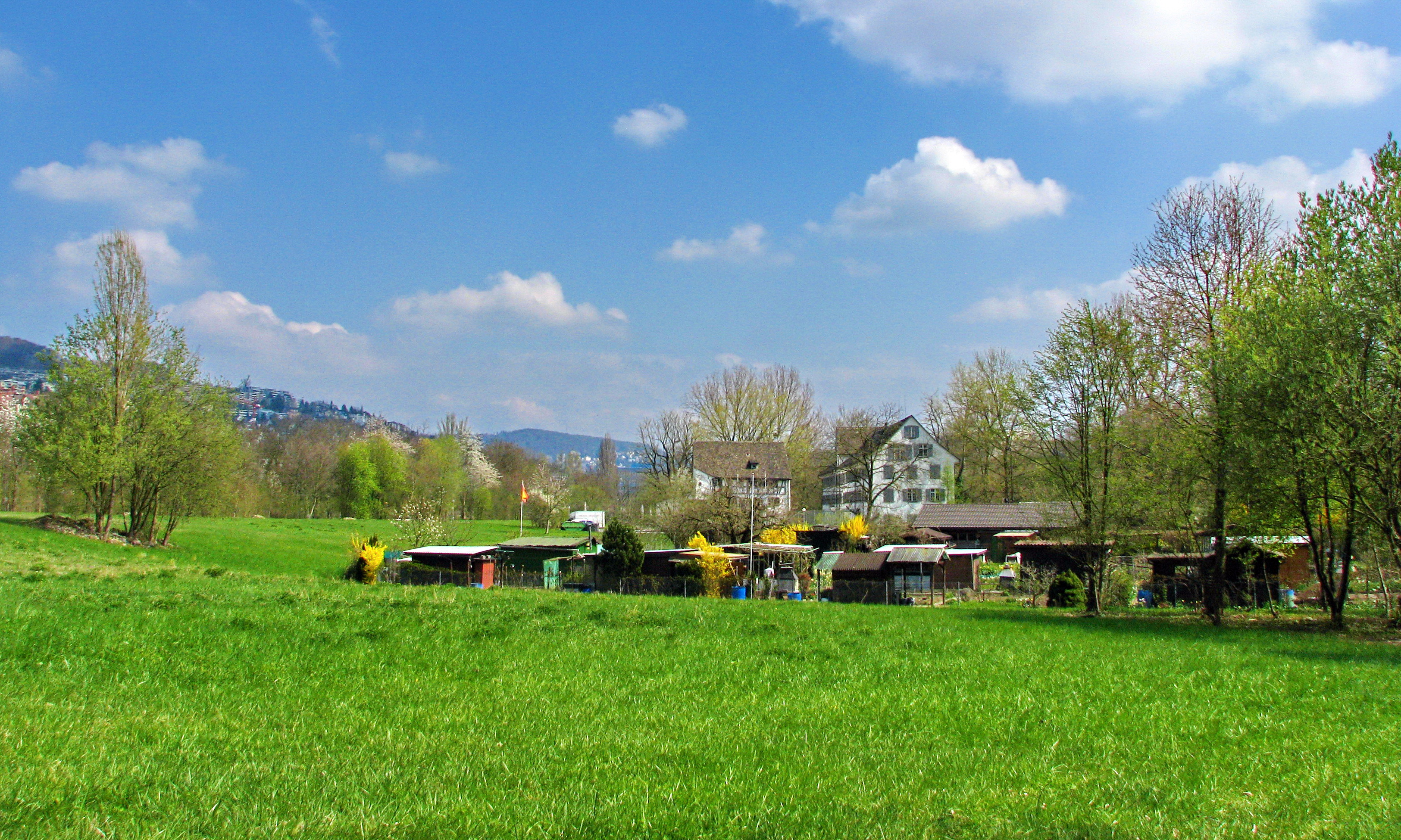 Werdinsel in Zürich-Höngg, Käferberg-Waidberg to the left.